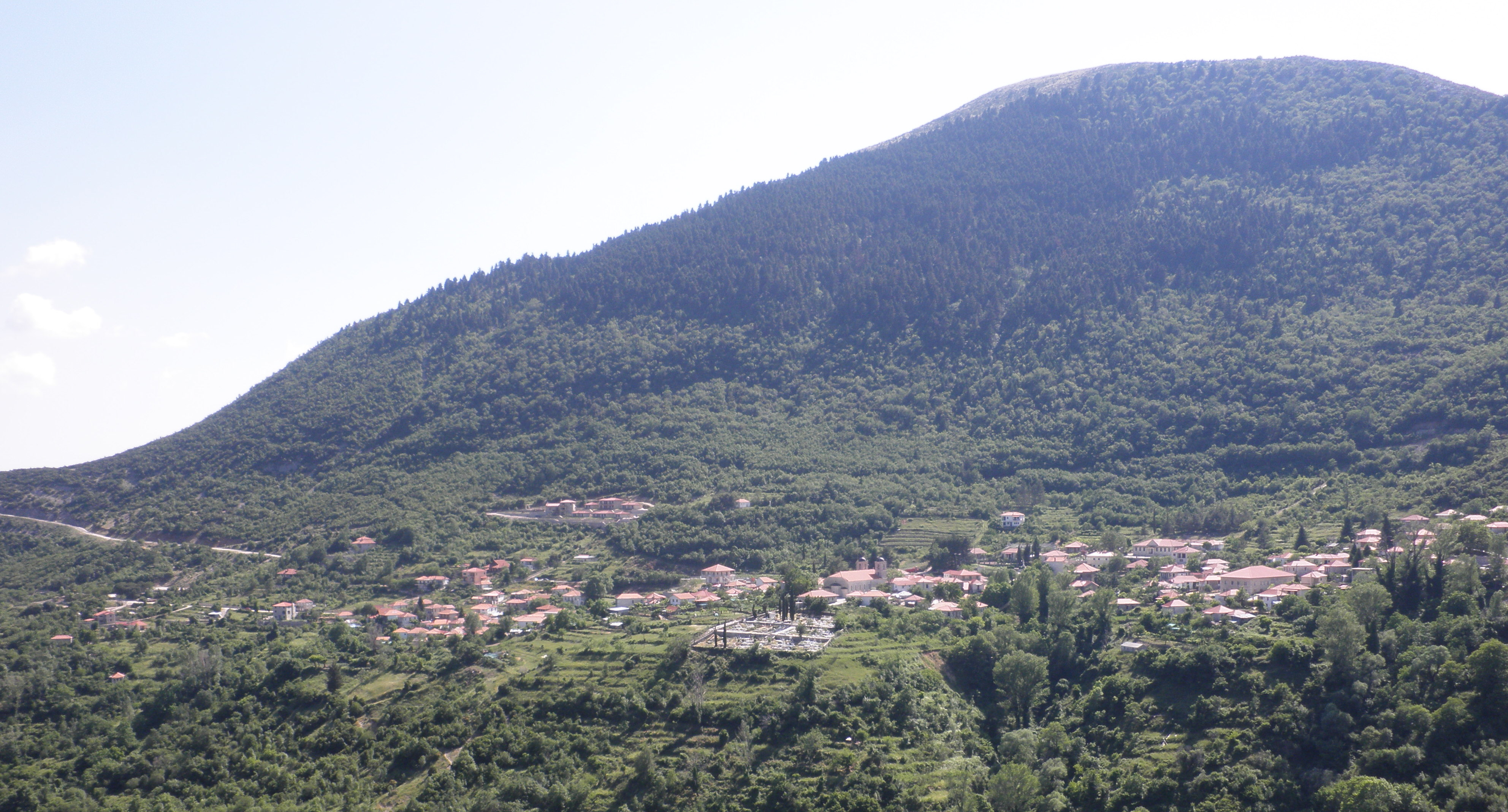 Platanos Nafpaktias